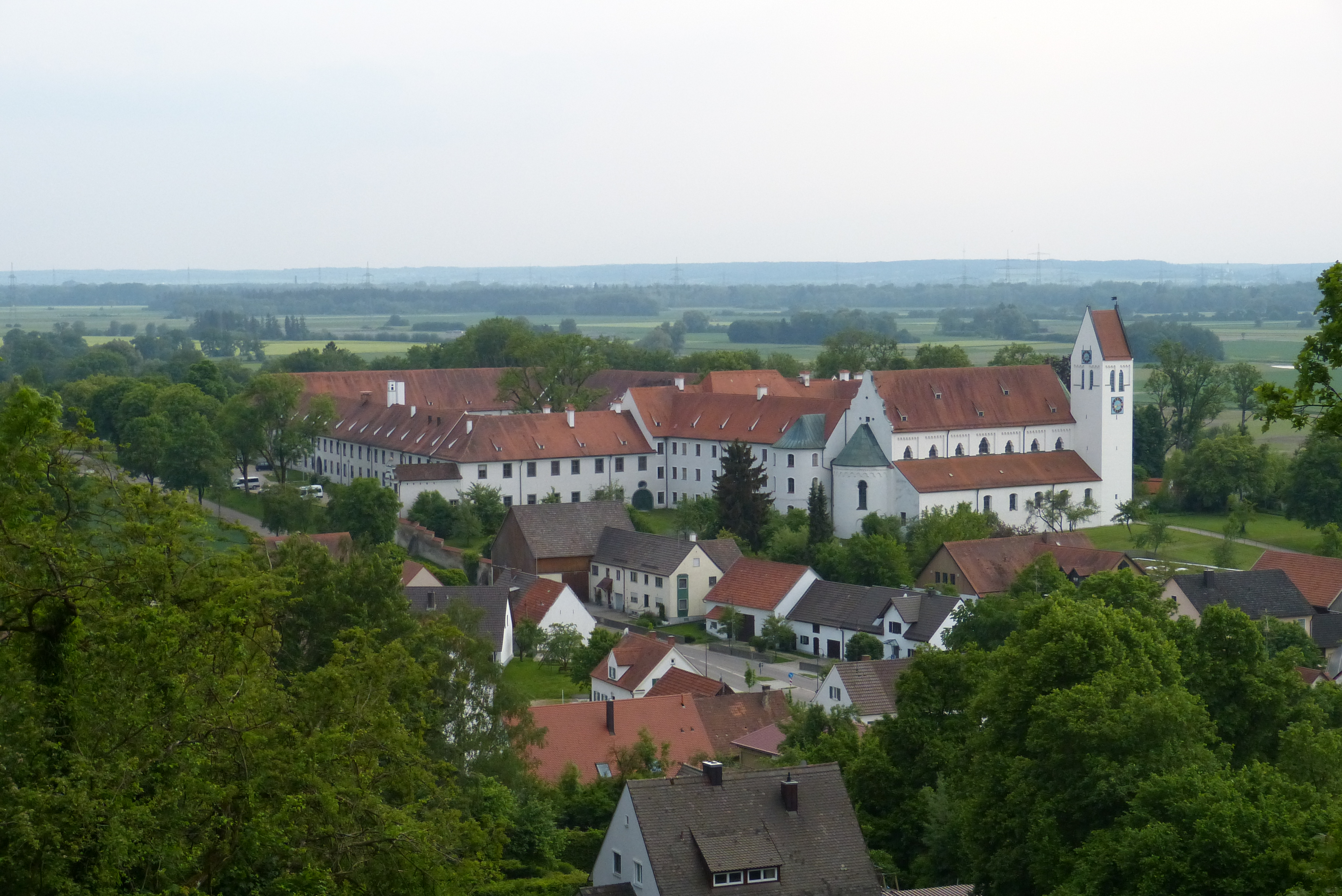 Kloster Thierhaupten, vom Kreuzberg aus fotografiert.